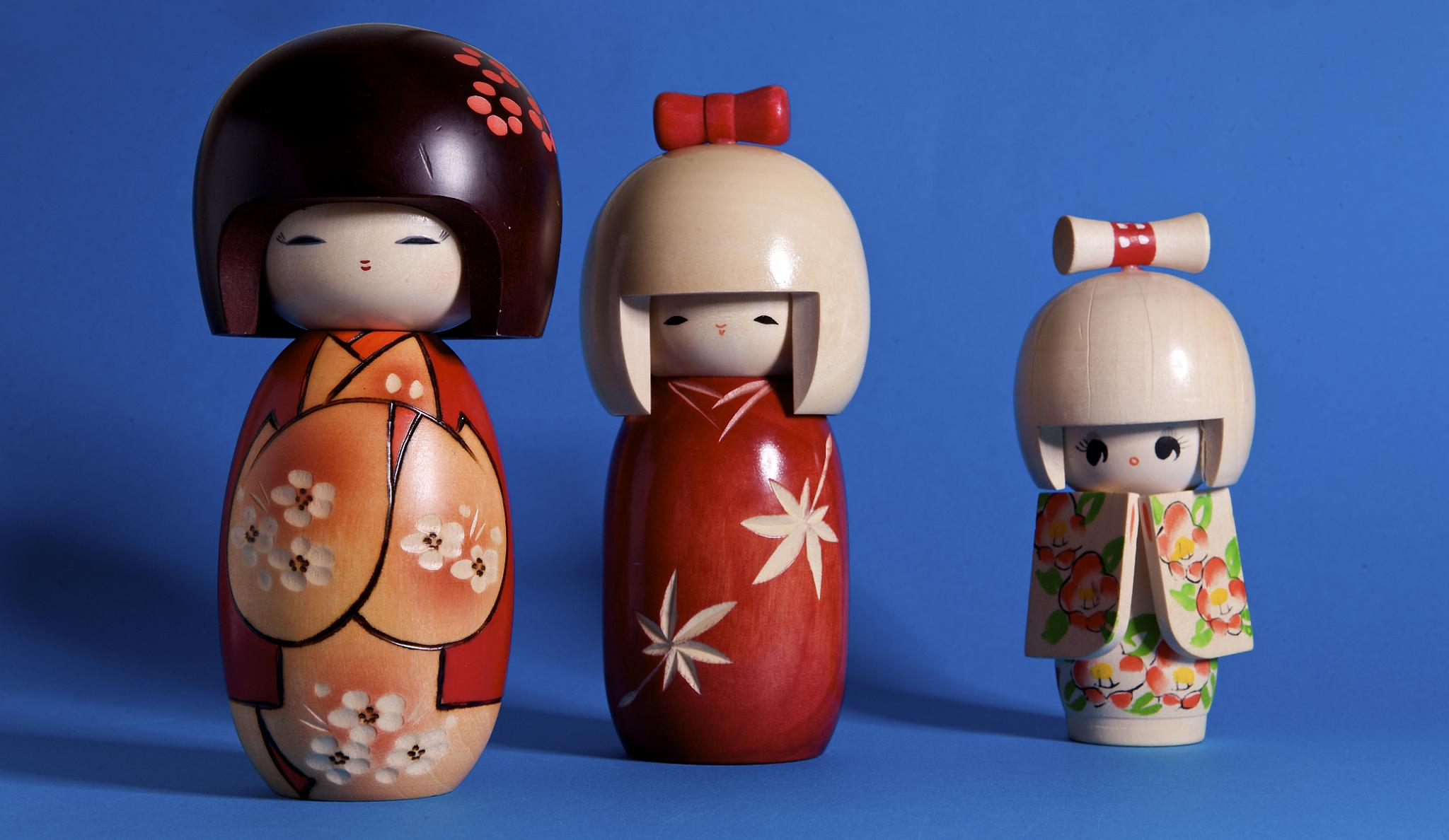 Kokeshi Kids